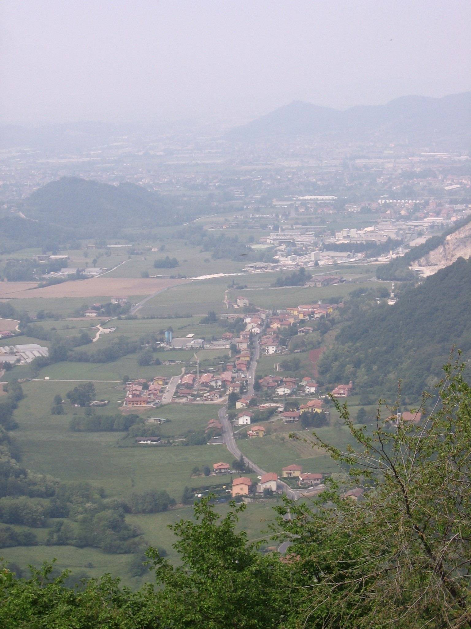 Zandobbio, fraz. Selva, Bergamo, Italia